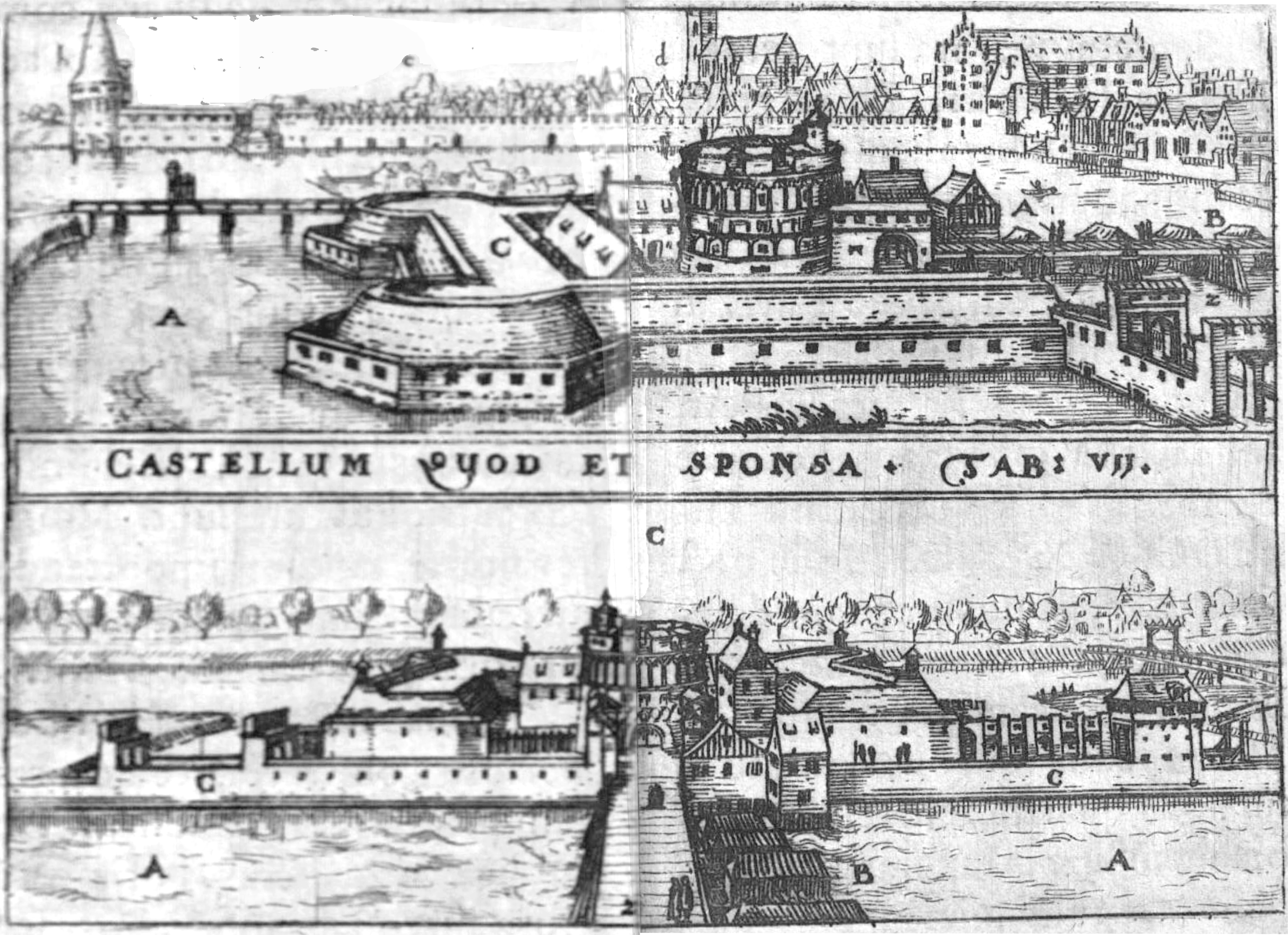 Brautbastion 1602 in 2 Ebenen: oben vom Stadtwerder flussabwärts zum STephaniviertel, unten von der Altstadt über Weser und kleine Weser (Die Neustadt gab es noch nicht.)